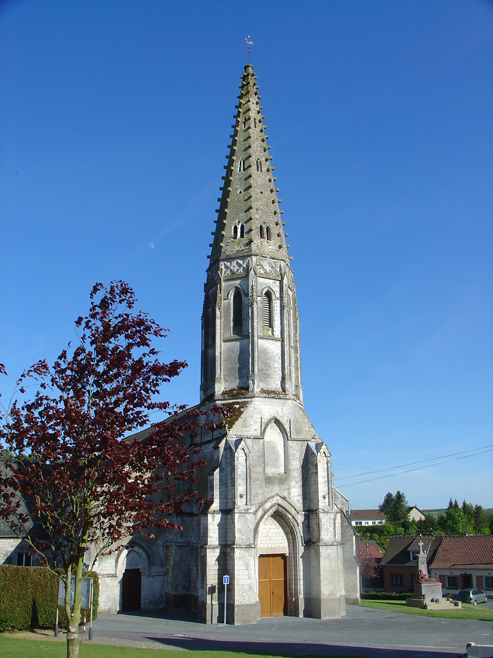 Église de Thiembronne